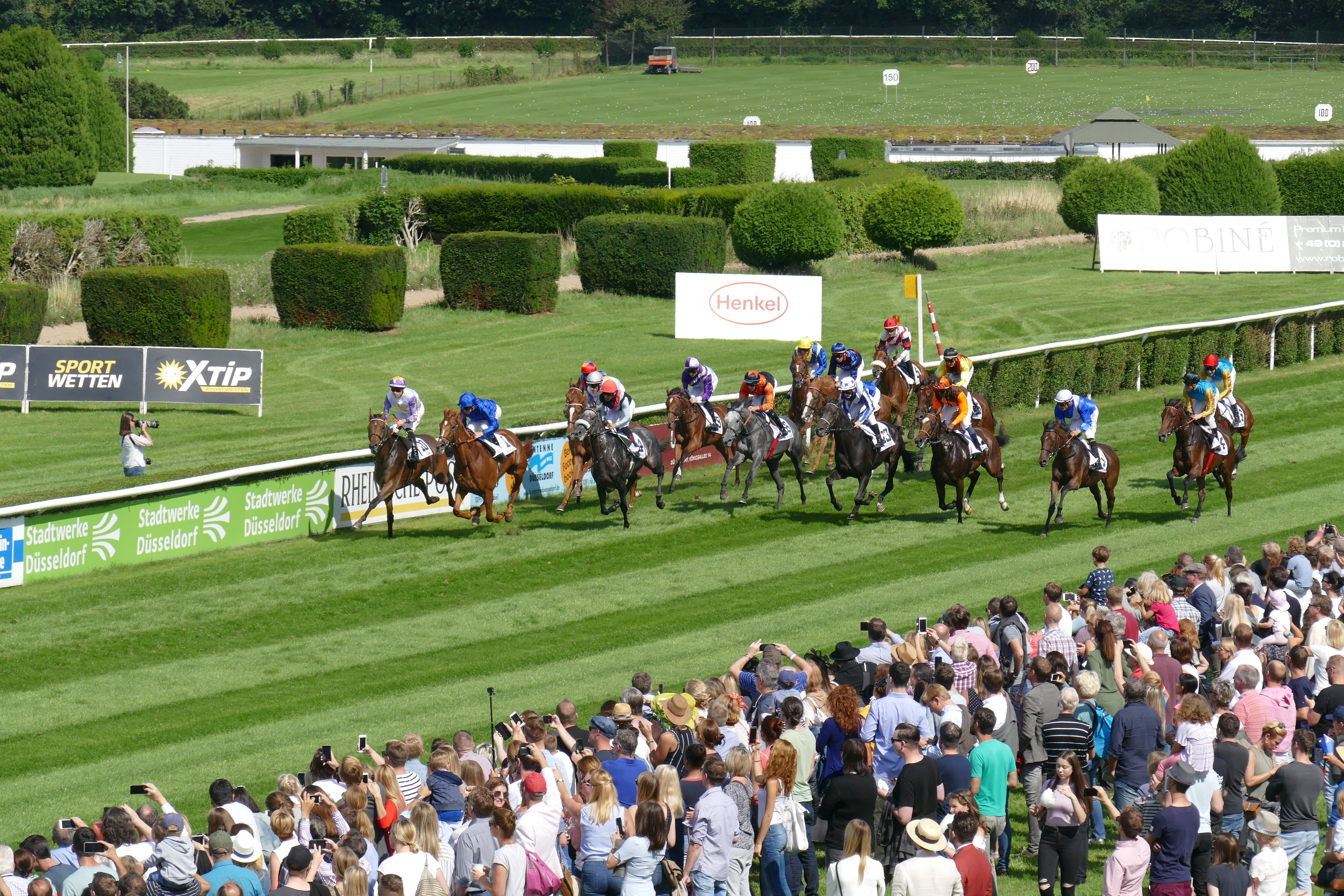 Die Pferde kurz nach dem Start zum Preis der Diana 2017